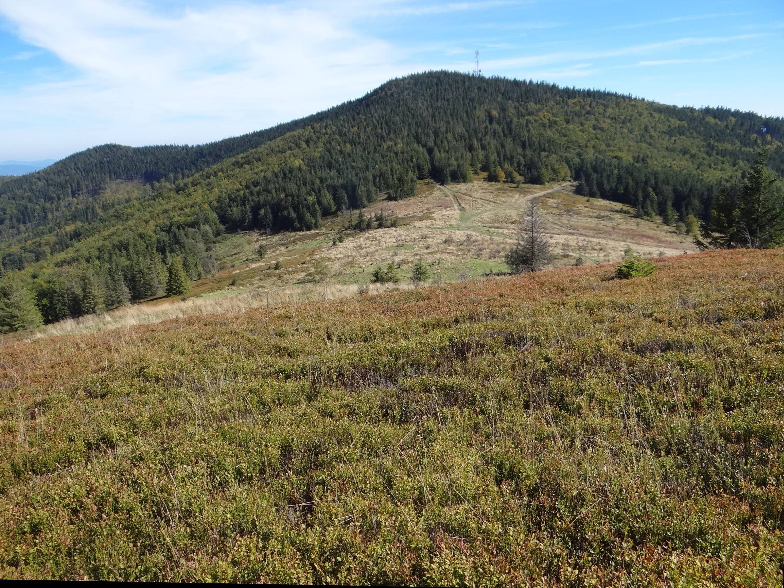 Widok z Jasnej Góry na Okrąglicę i Kucałową Przełęcz